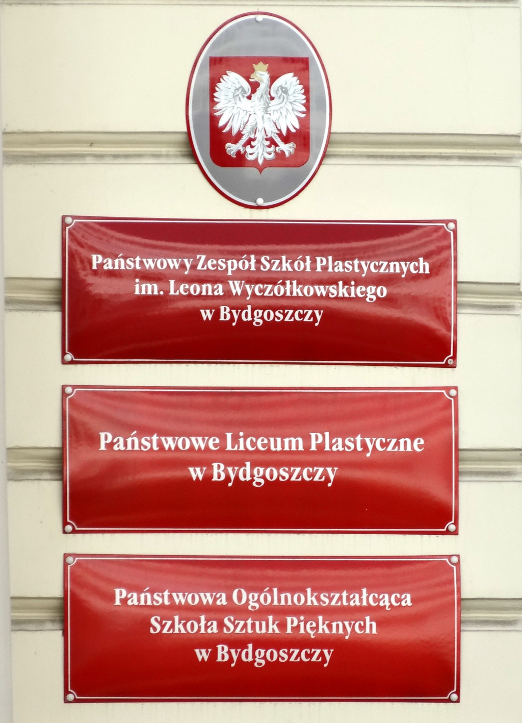 Budynek Zespołu Szkół Plastycznych w Bydgoszczy (1875-1878, Heinrich Grüder) przy ul. Konarskiego